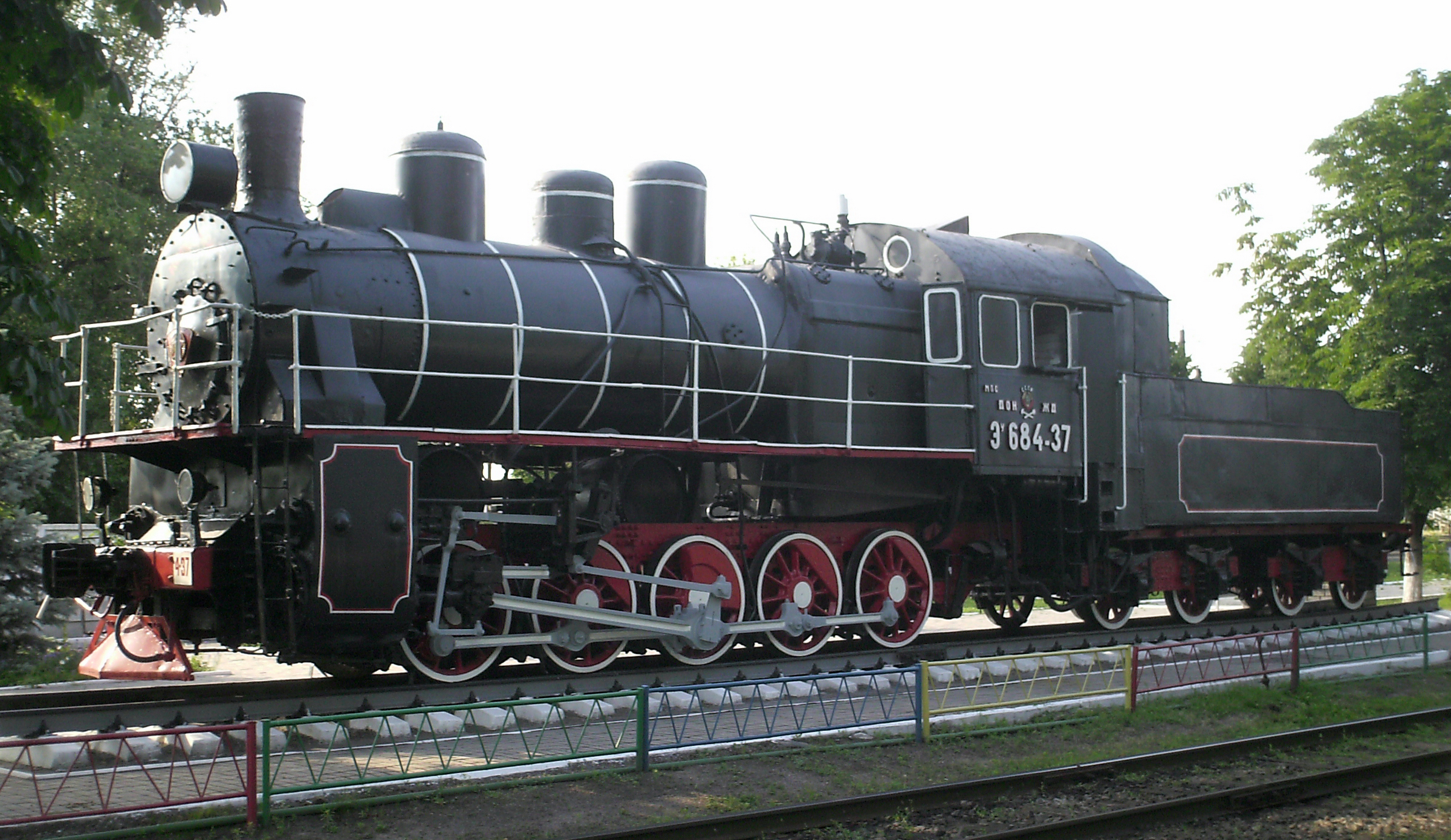 паровоз Петра Кривоноса Эу684-37 в Славянске